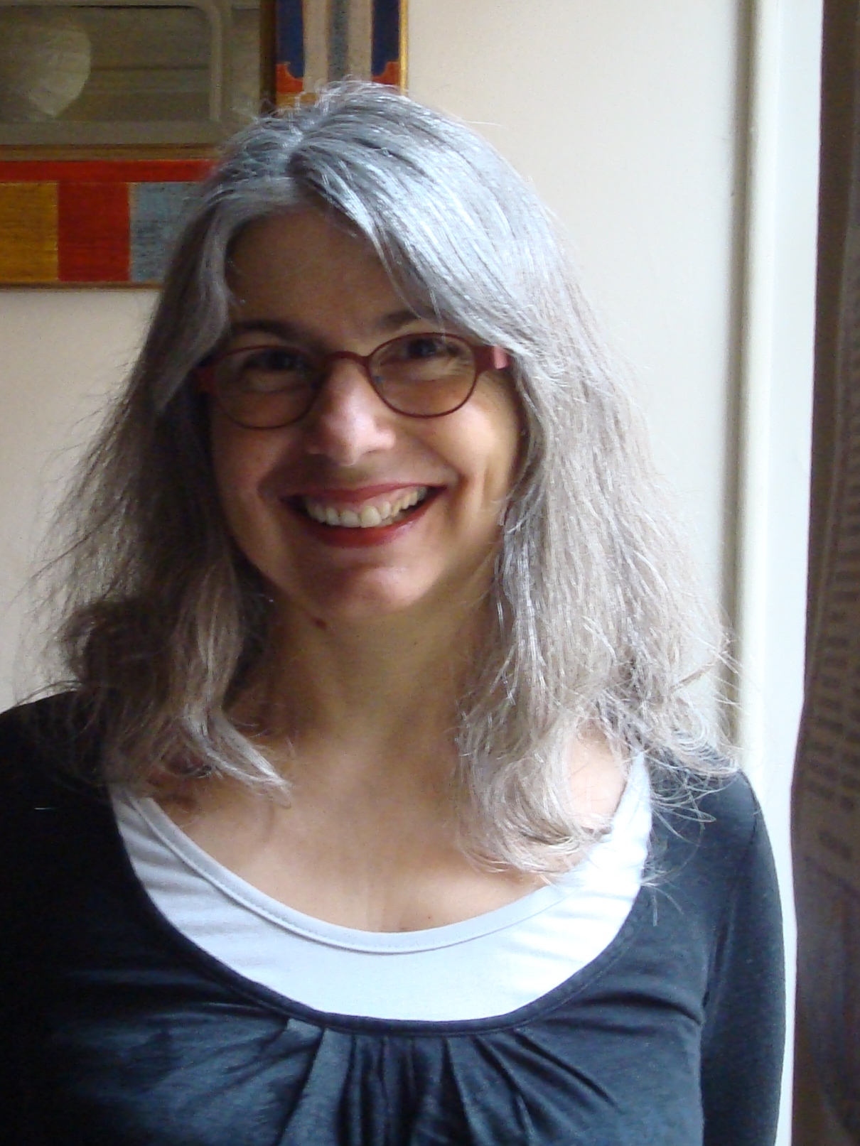 Alina Reyes en 2011